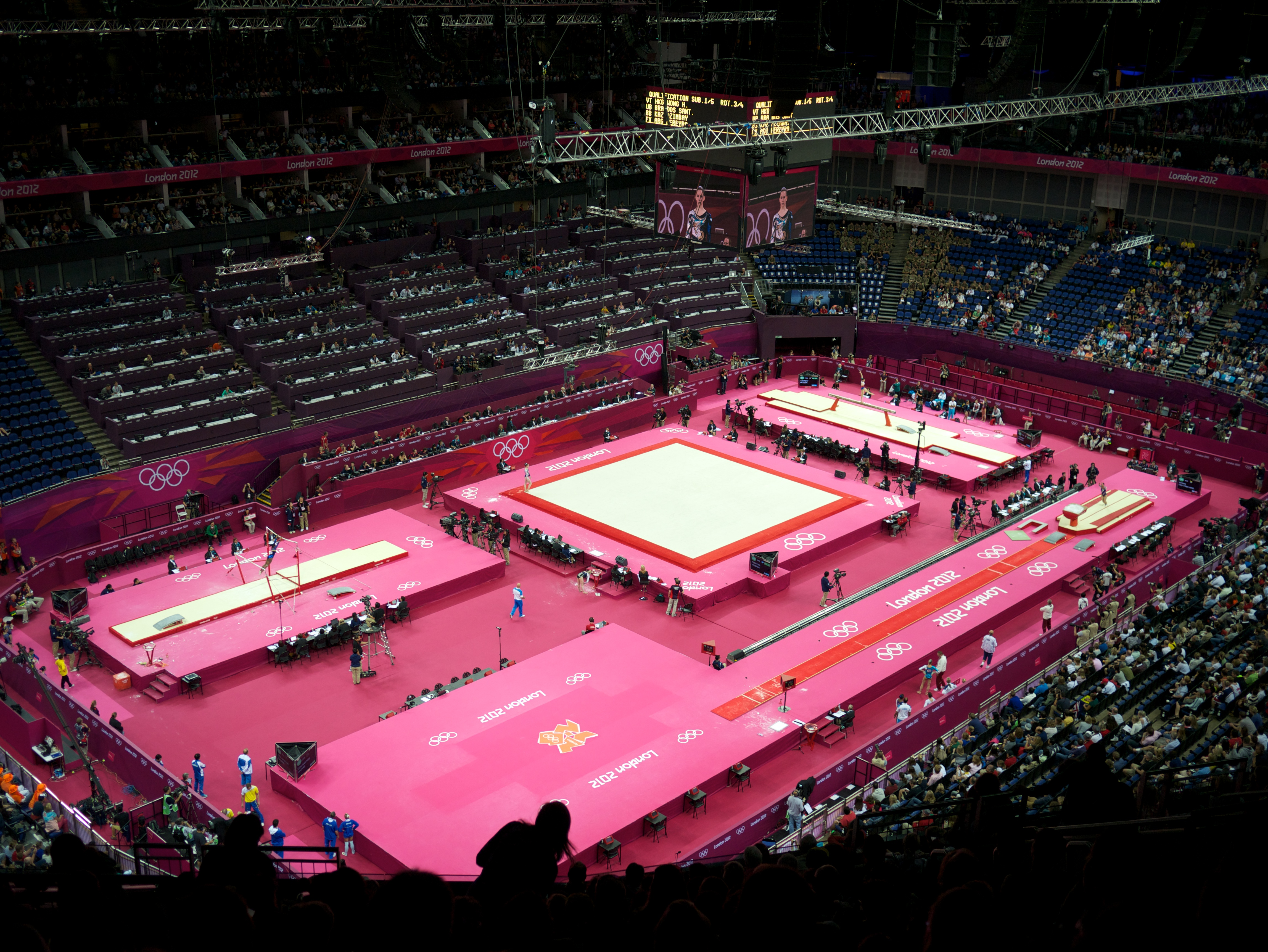 North green arena, london 2012